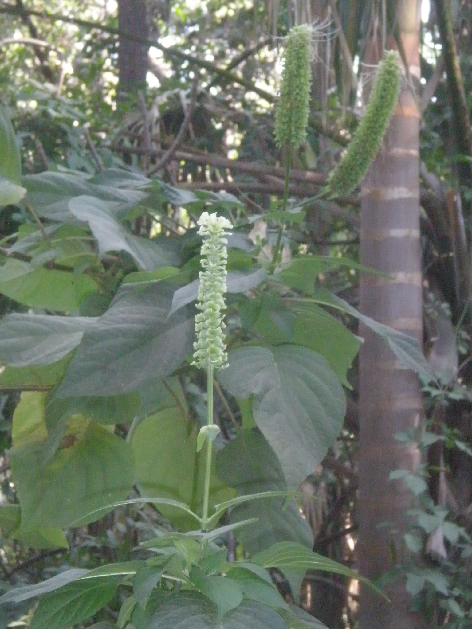 Jardín Botánico Faustino Miranda, Tuxtla Gutiérrez, Chiapas, México.